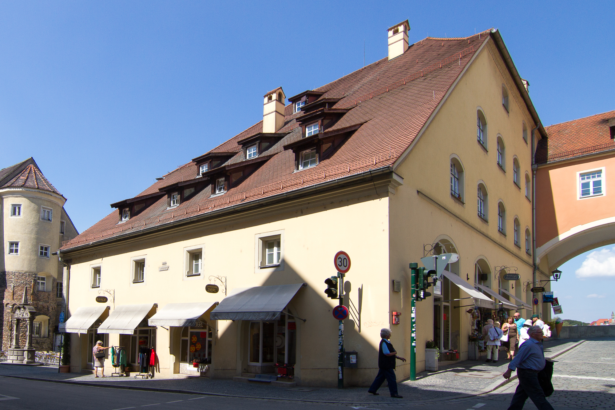 Ehem. Amberger Stadel; viergeschossiger und traufständiger Halbwalmdachbau, 1487, 1551 wiederhergestellt, Innenumbauten 20. Jh.;This is a photograph of an architectural monument.